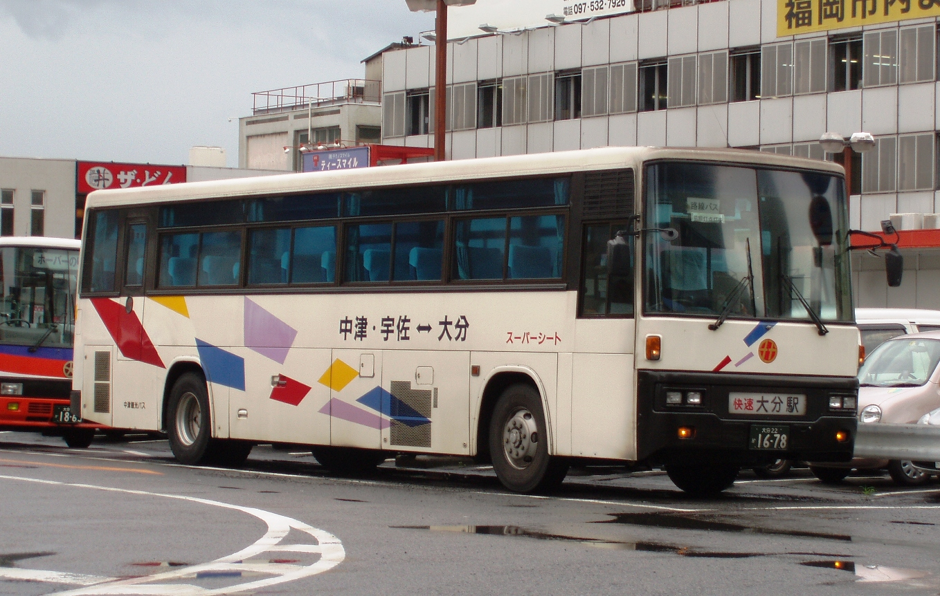 中津観光時代